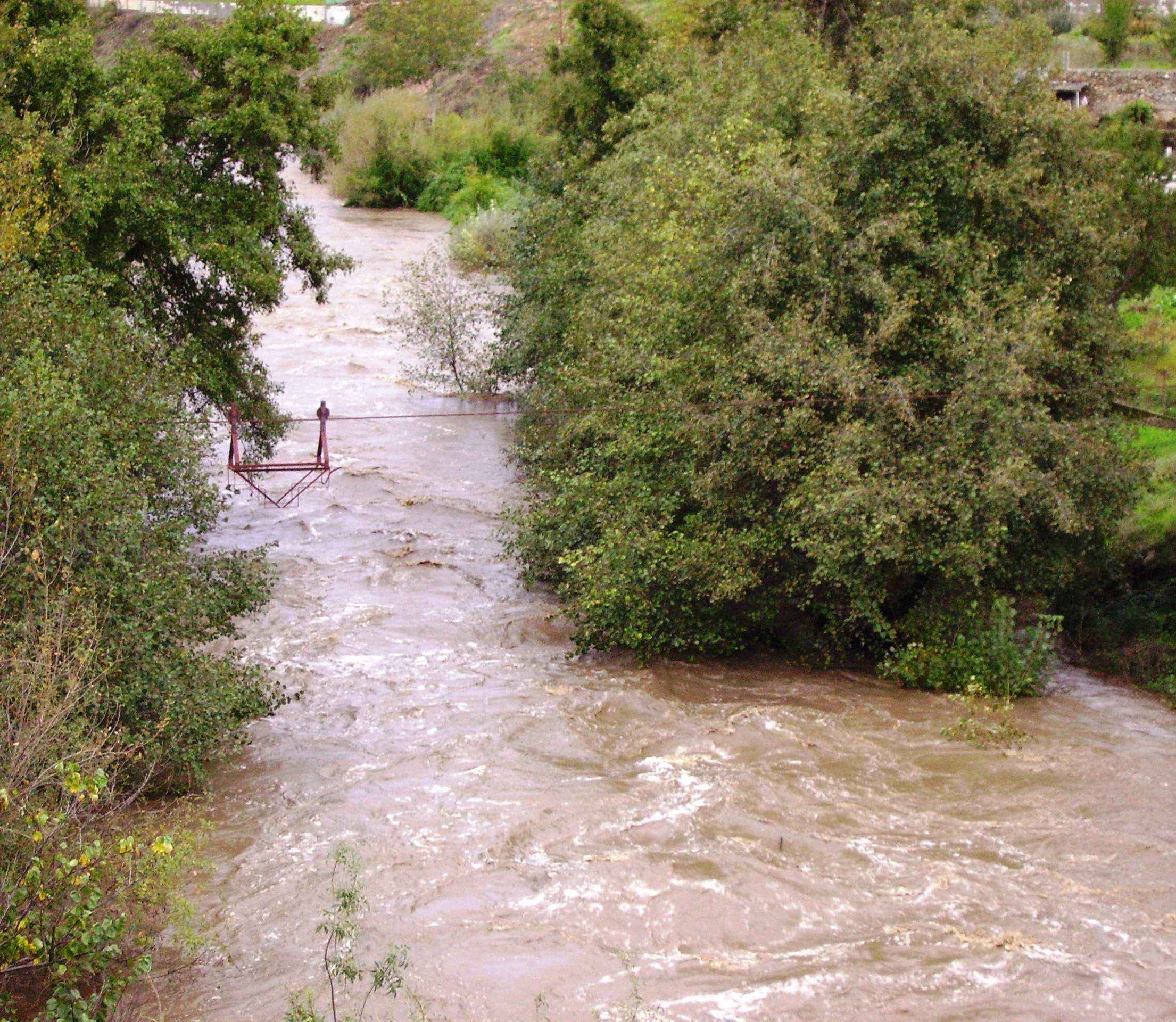 Río Boeza a su paso por Ponferrada (El Bierzo).